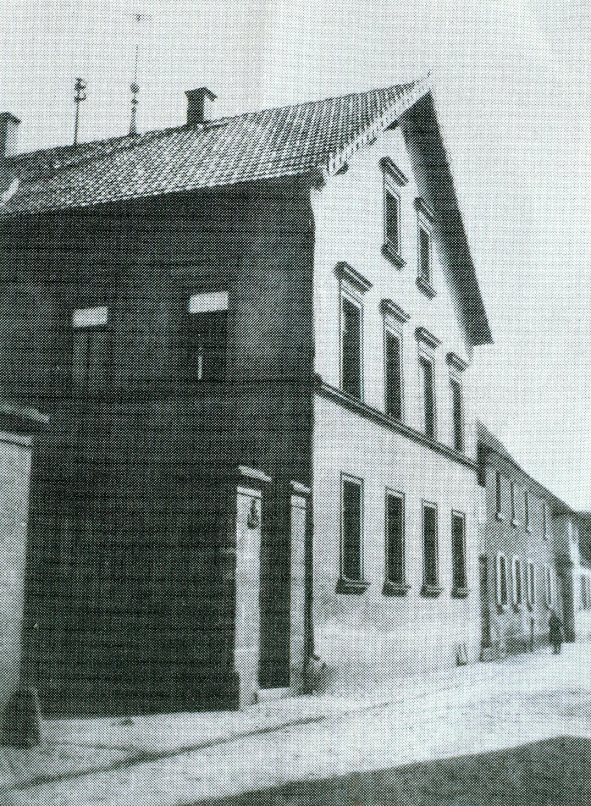 Das umgebaute Wohngebäude auf dem Domhof im rheinhessischen Guntersblum in Rheinland-Pfalz 1901